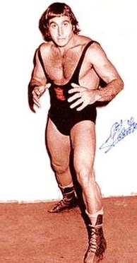 Lucio Giunti luchador profesional argentino